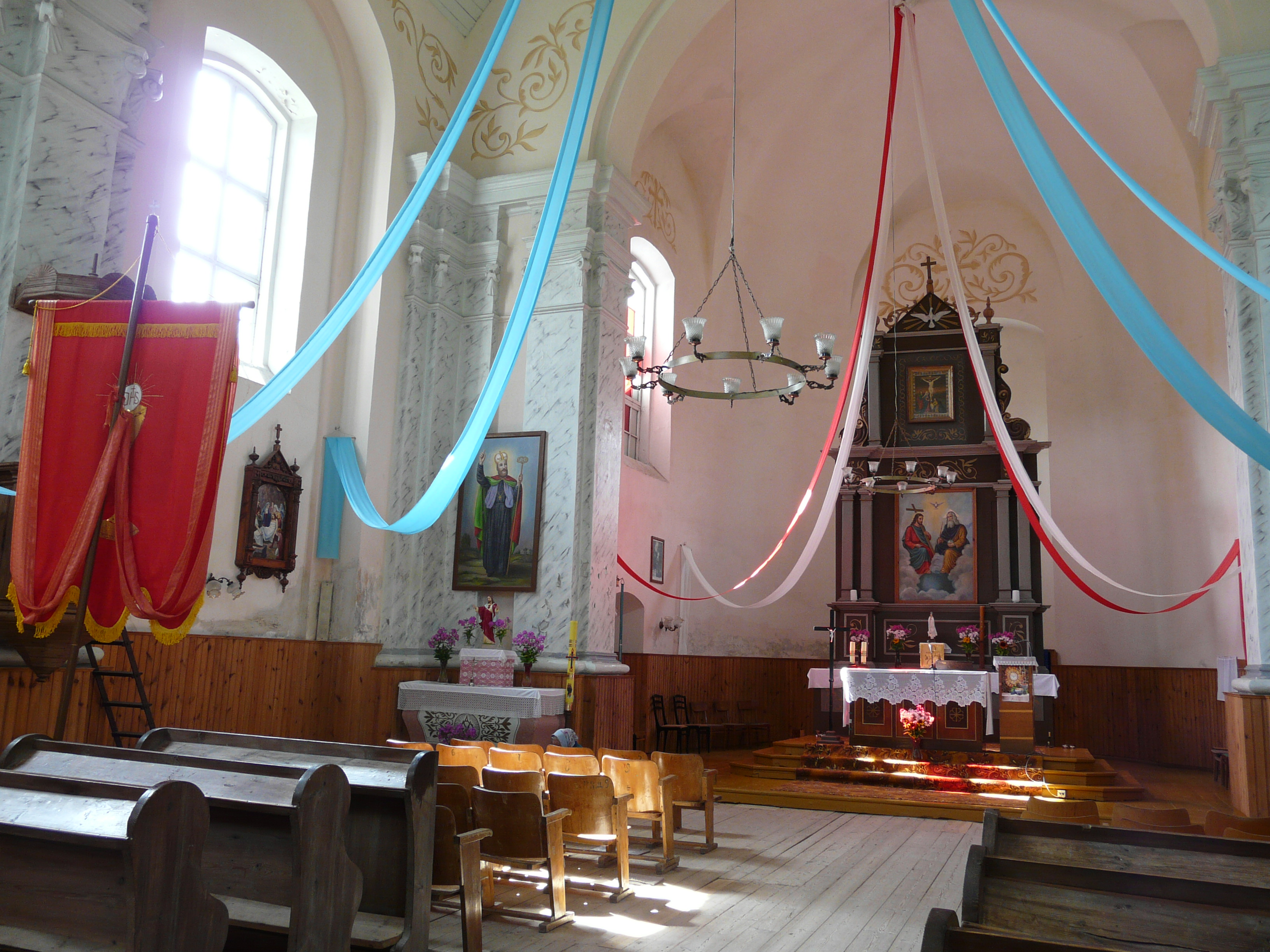 Беларуская (тарашкевіца): Комплекс кляштара кармэлітаў: касьцёл жылы кляштарны корпус вежа-званіца брама. в. Засьвір This is a photo of Belarusian heritage monument. Reference number: 612Г000430 ( WLM)